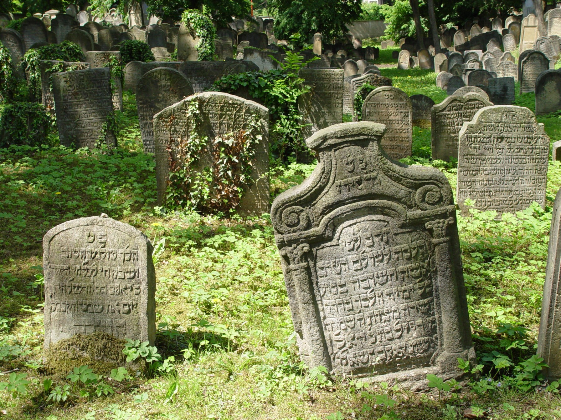 Starý židovský hřbitov v Novém Bydžově